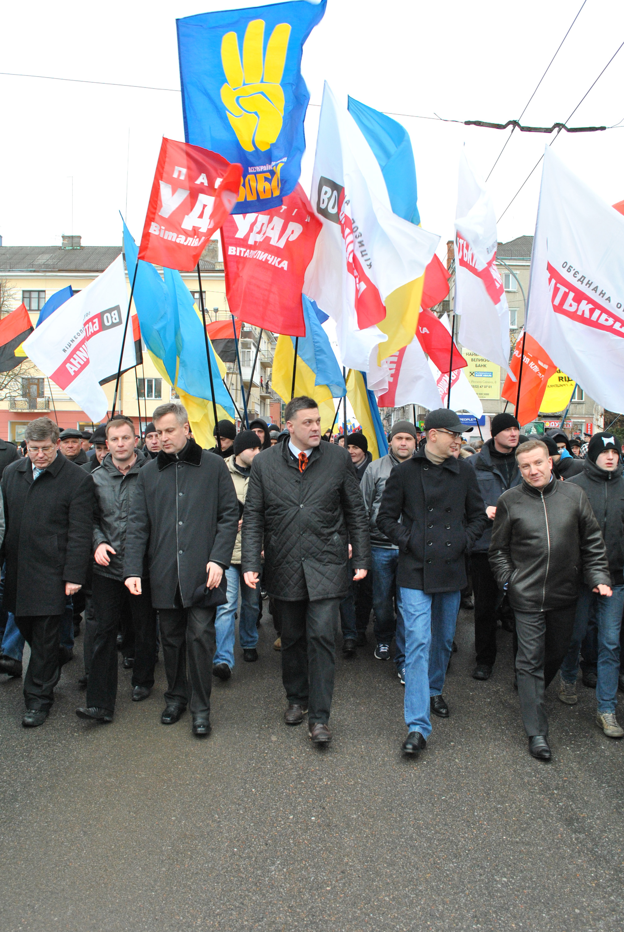 Марш вулицями Тернополя під час акцій протесту проти режиму президента України Віктора Януковича «Вставай, Україно!». У першому ряду (зліва направо): невідомий, Степан Барна, Валентин Наливайченко, Олег Тягнибок, Арсеній Яценюк, Роман Заставний.